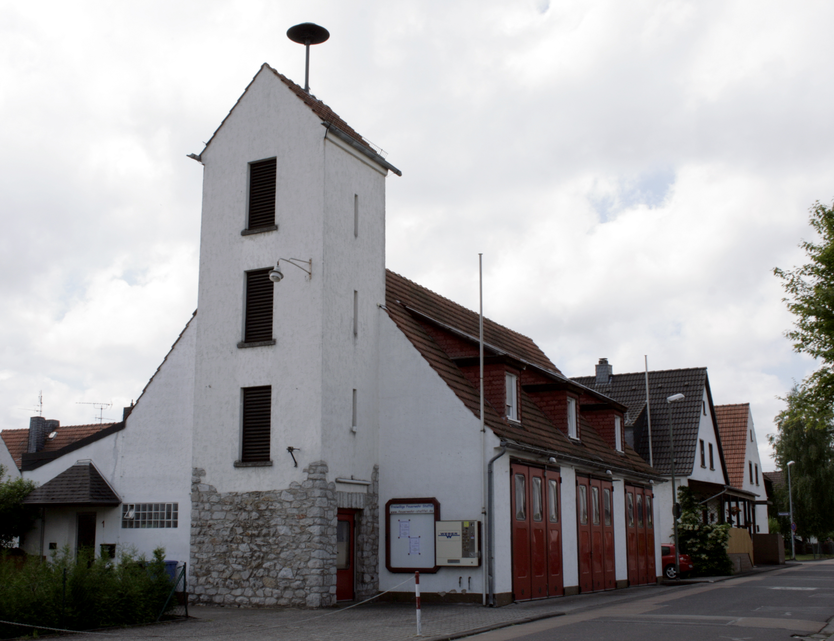 Feuerwehrhaus von Limburg-Staffel, Deutschland